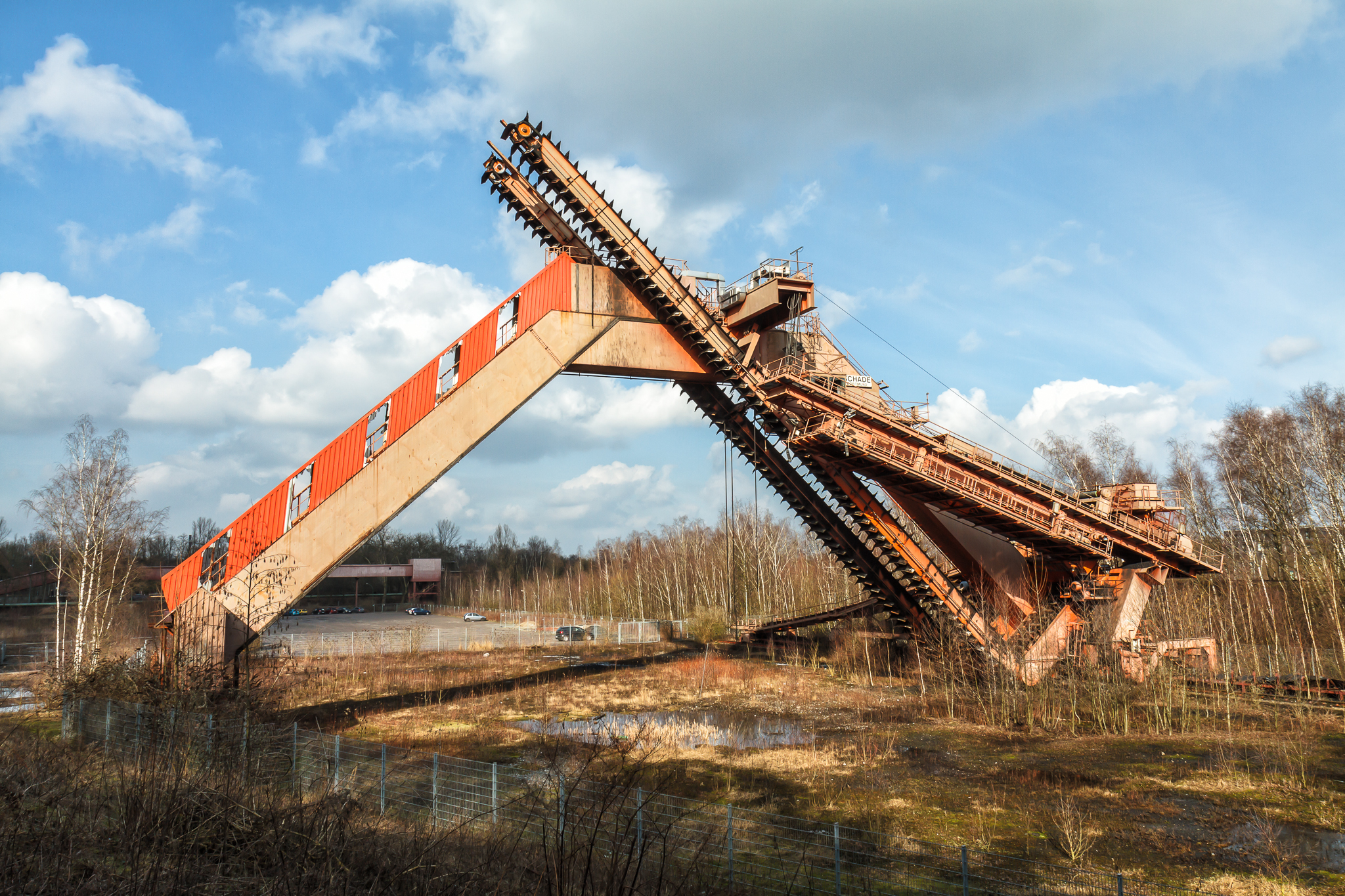 Zeche Zollverein - Fördermaschine der Maschinenfabrik Gustav Schade - 2013